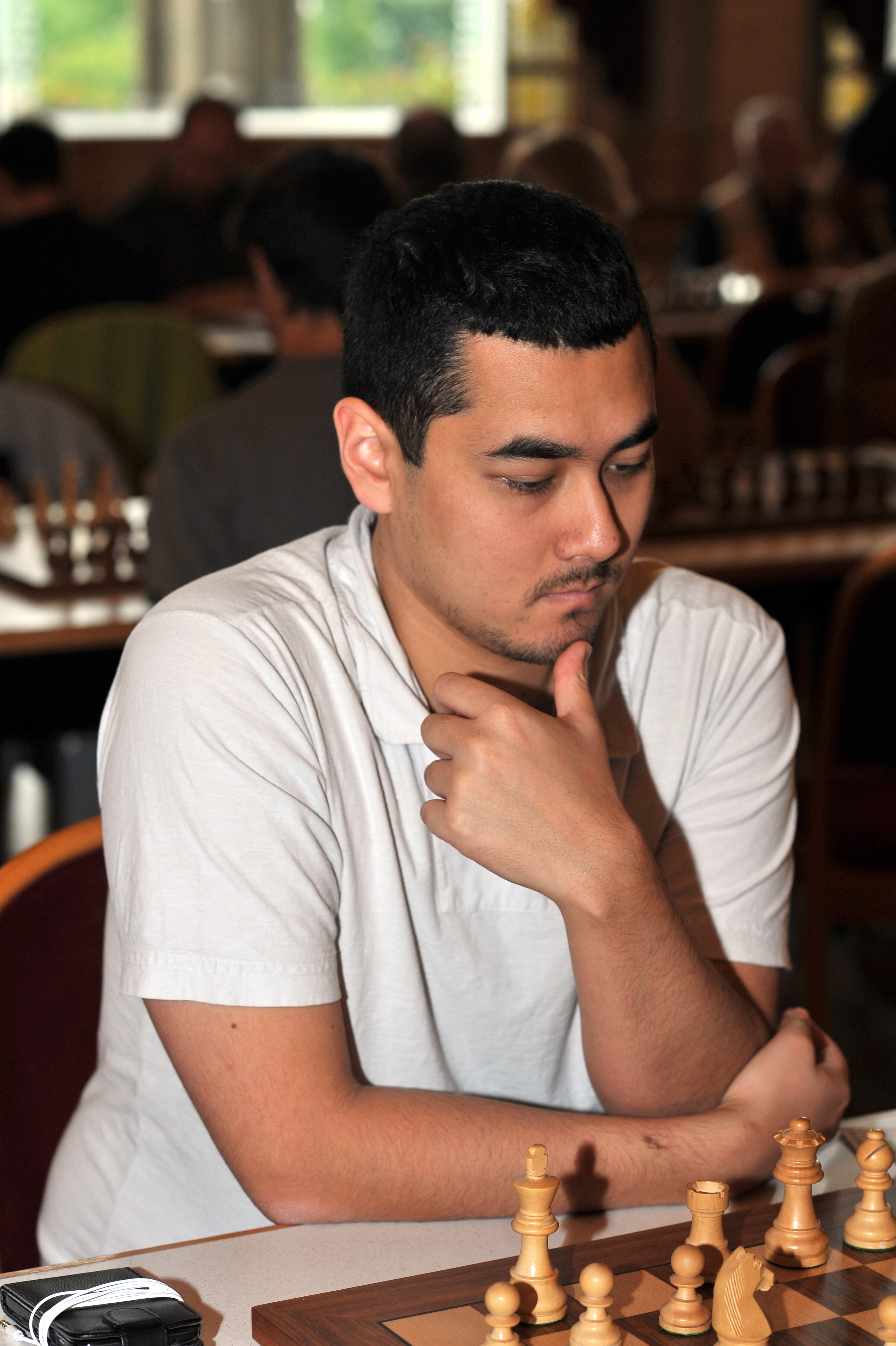 Vienna Chess Open 2013, A-Turnier: 8. Runde am 24. August 2013 - GM Alexandr Fier